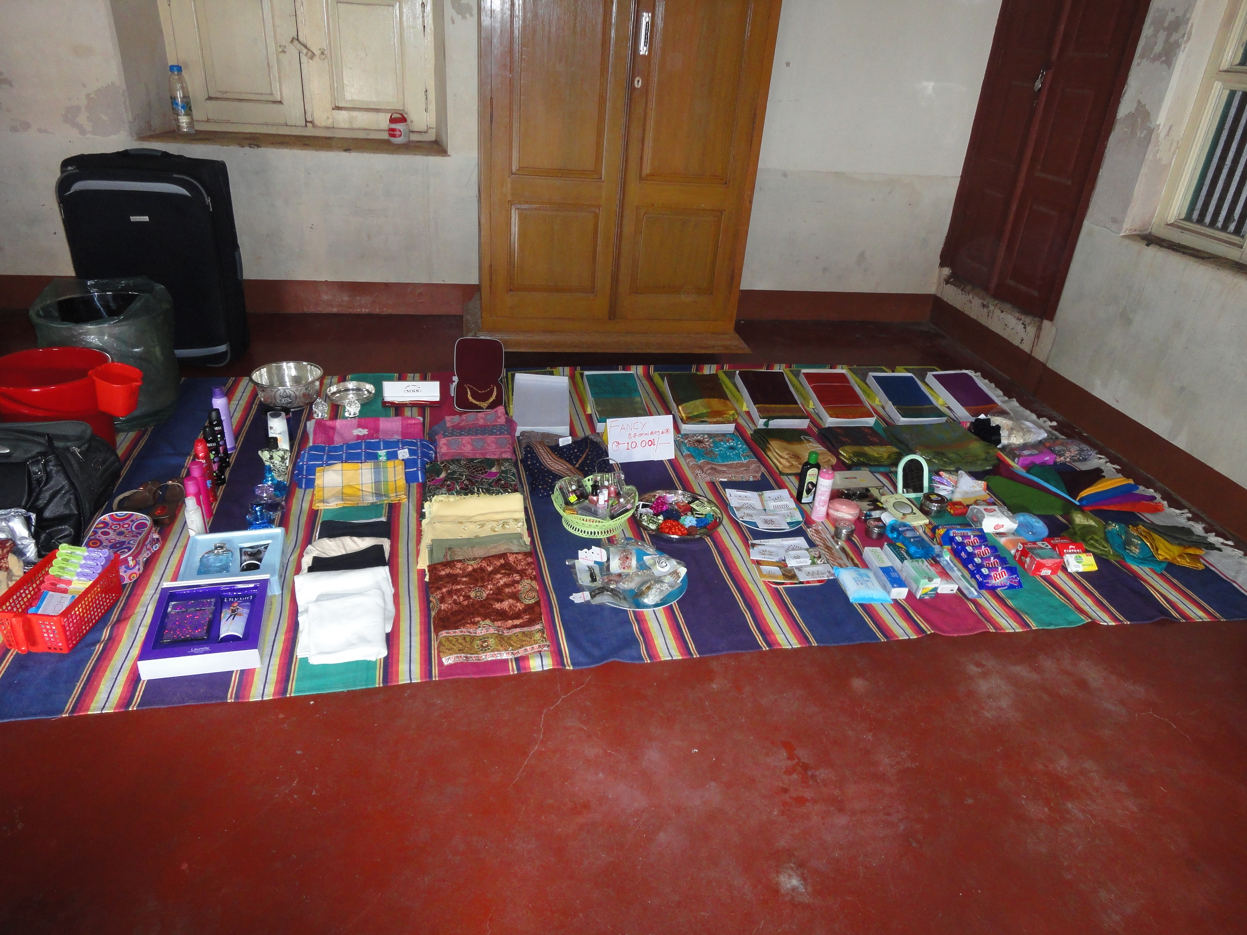 சீதனப் பொருட்கள்